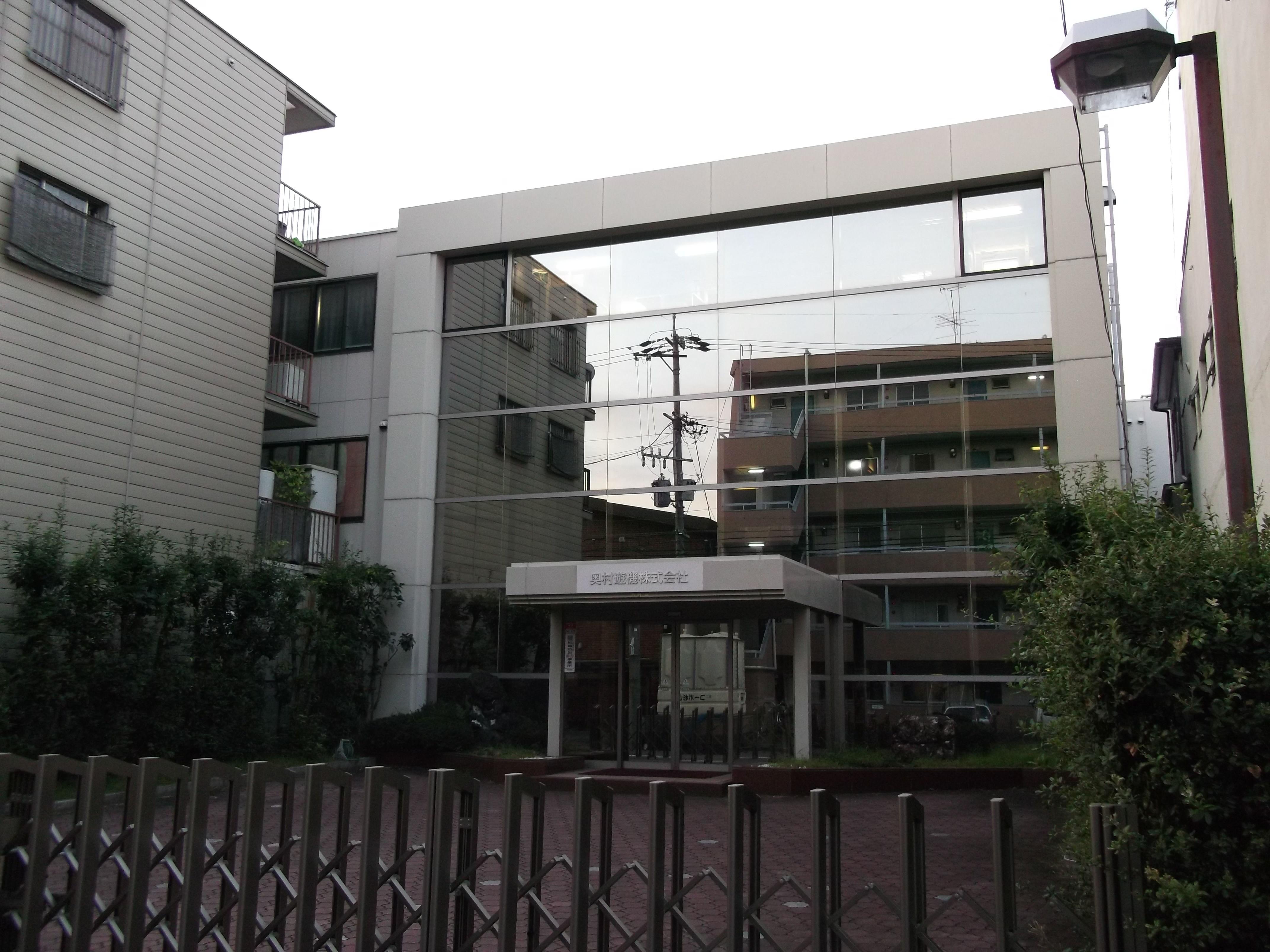 名古屋市昭和区鶴舞の奥村遊機本社を南側公道より撮影